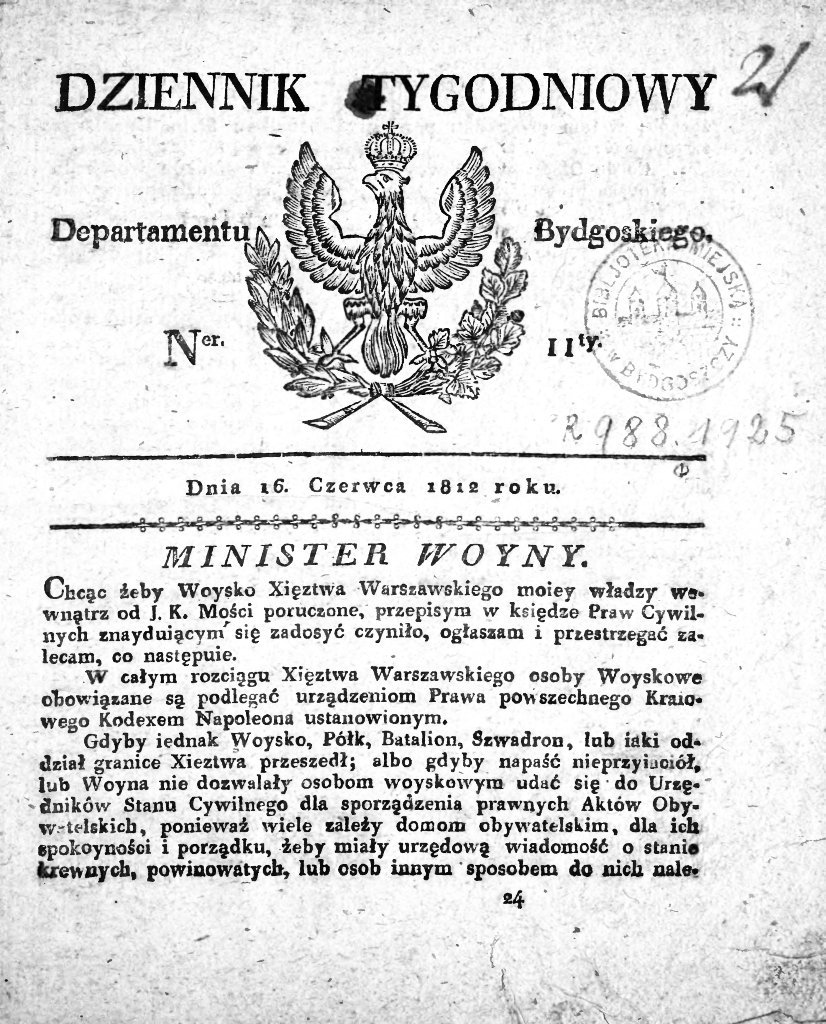 Dziennik Tygodniowy Departamentu Bydgoskiego, 16 czerwca 1912 r.; pierwsza gazeta wydawana w Bydgoszczy od 1807 r.